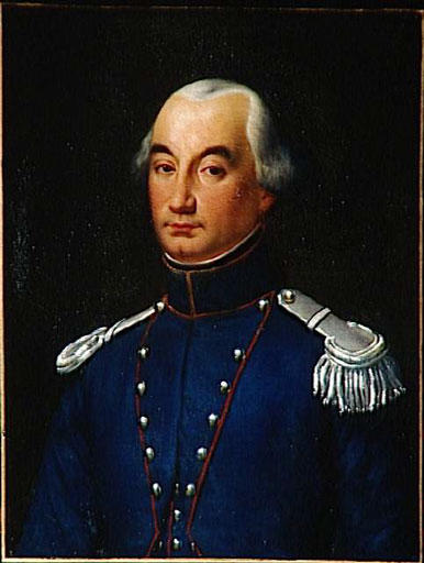 Commandé par Louis-Philippe pour le musée historique de Versailles en 1835